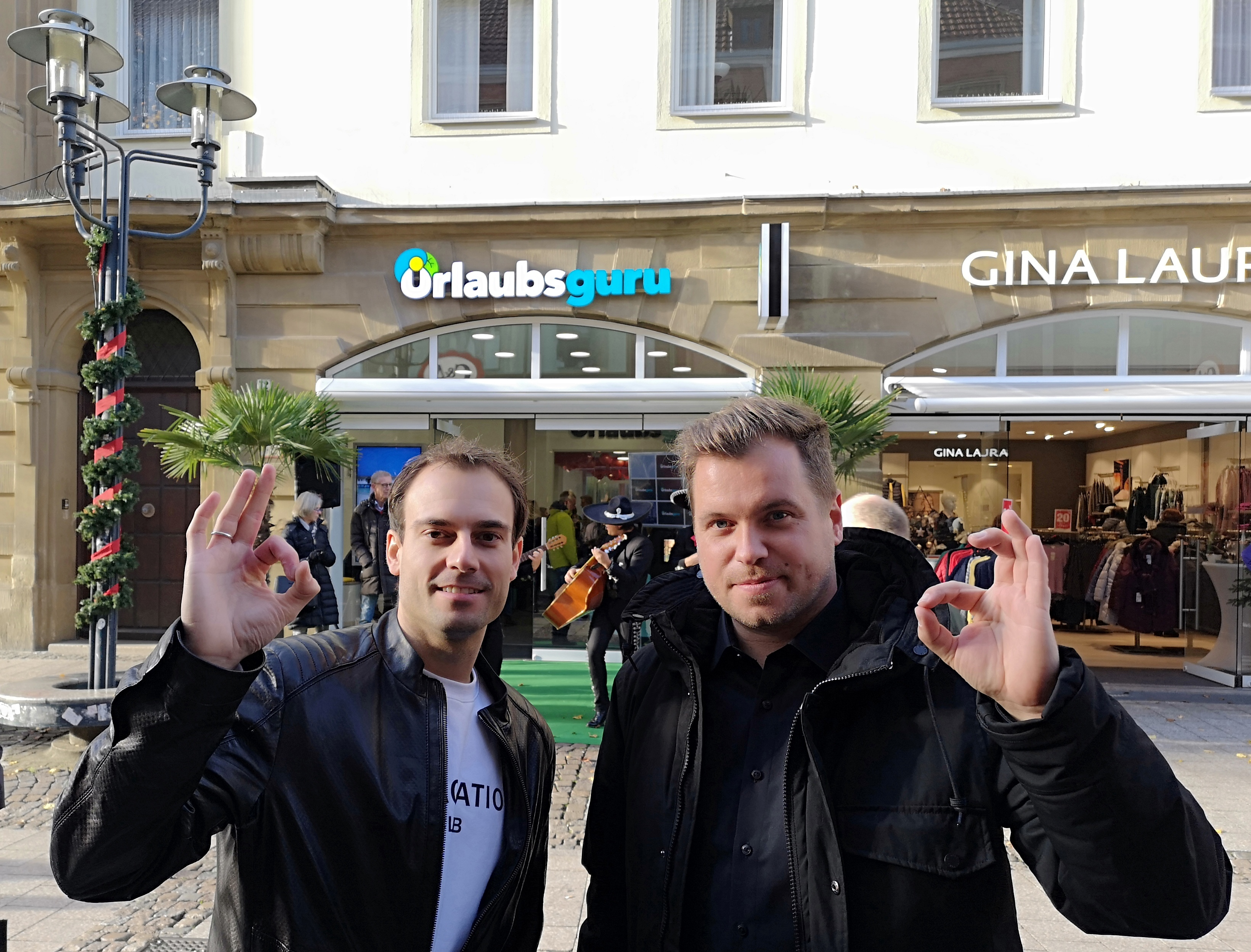 Daniel Marx (links) und Daniel Krahn, Gründer von Urlaubsguru, bei der Eröffnung ihres Flagshipstores und Reisebüros in Münster